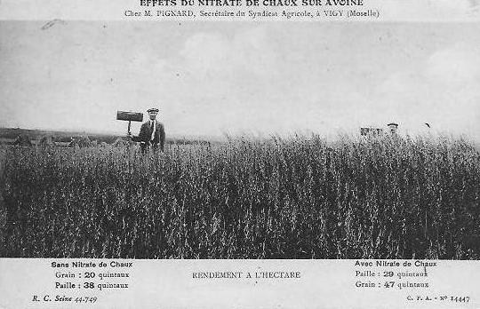 effets du nitrate de chaux sur avoine - 57640 vigy